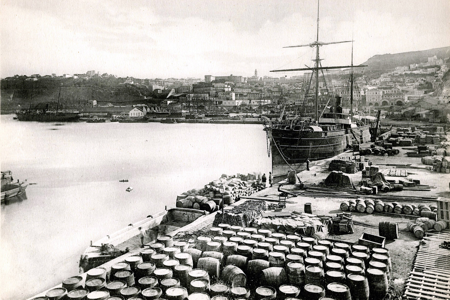 Carte postale d'Algérie.